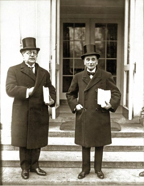 Beltrán Mathieu embajador de Chile en Estados Unidos y Adrián Velarde Embajador de Perú en Estados Unidos, saliendo de la Casa Blanca una vez recibido el fallo del laudo arbitral sobre Tacna y Arica del Presidente estadounidense Calvin Coolidge. Fuente: Biblioteca del Congreso Nacional de Chile-BCN (donación familia Alessandri).